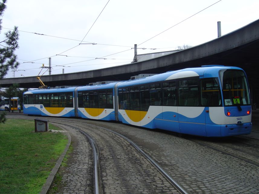 DPMO Ostrava